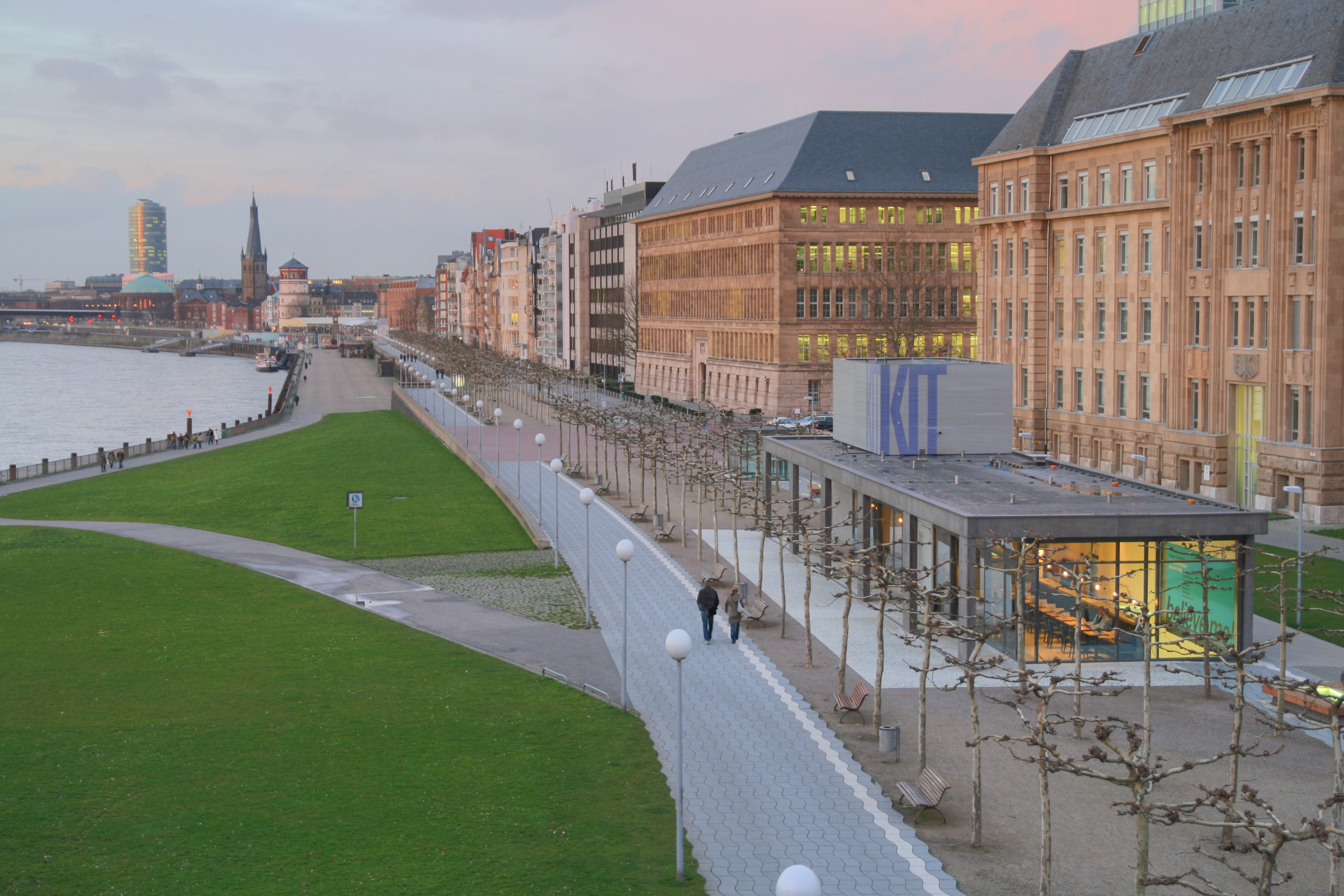 "Kunst im Tunnel (KIT)" art gallery in Düsseldorf, Germany.